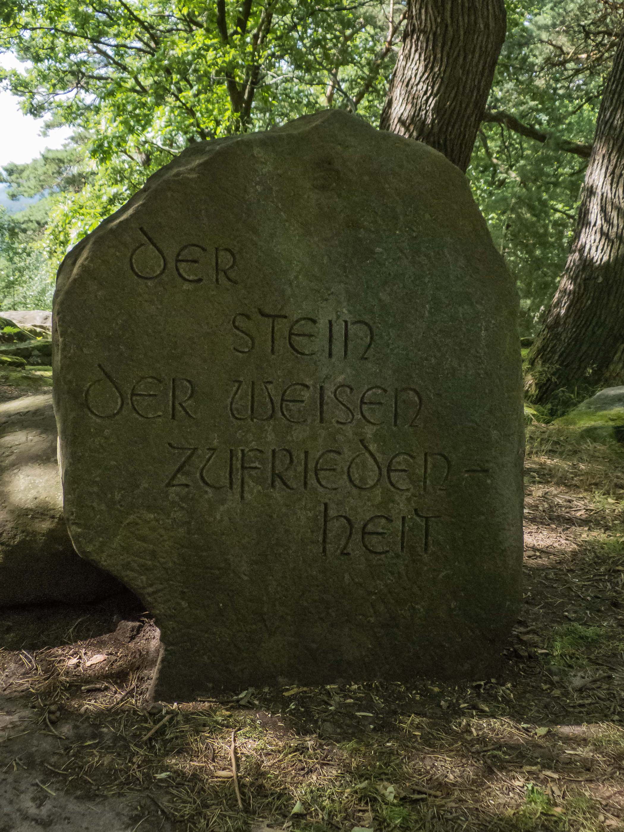 Stein der Weisen Zufriedenheit auf dem Nollenkopf